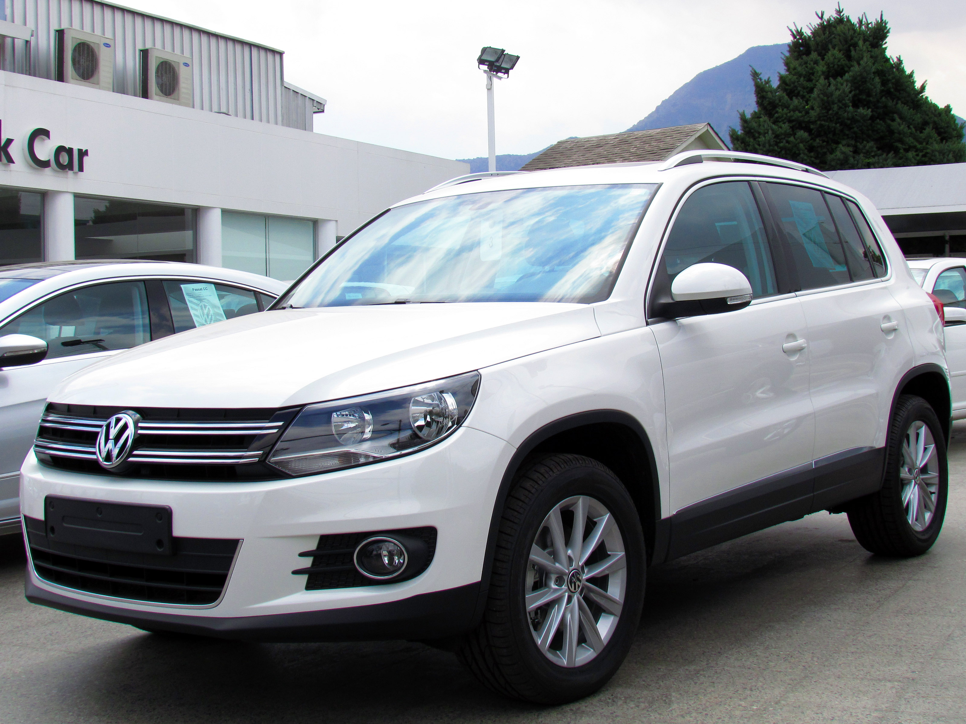 Volkswagen Tiguan 2.0 TSi Highline 4Motion 2012